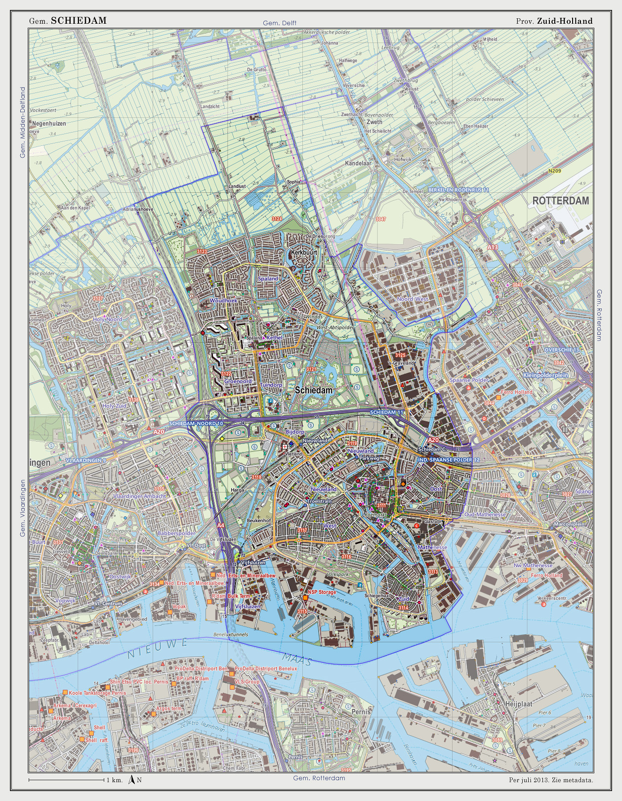 Topografische kaart van gemeente Schiedam (2013). Samengesteld door Jan-Willem van Aalst op basis van de GML open geodata van de BRT/Top10NL (basisregistratie Topografie, Kadaster 2011), vrijgegeven door Kadaster onder de Creative Commons BY licentie. Additionele gegevens uit BAG (8 juli 2013), uit de Open Street Map (9 juli 2013) en uit de Risicokaart. Peildatum kaartbeeld: 9 juli 2013. Zie ook Gemeentenatlas.nl Samenstelling en kleurenschema: Jan-Willem van Aalst, met QuantumGIS en Photoshop. Zie ook de Legenda.